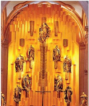 Retablo mayor de Nuestra Señora de la Asunción, en la Catedral de Zacatecas, hecho de estilo contemporáneo en abedul finlandes con hoja de oro y esculturas de bronce.